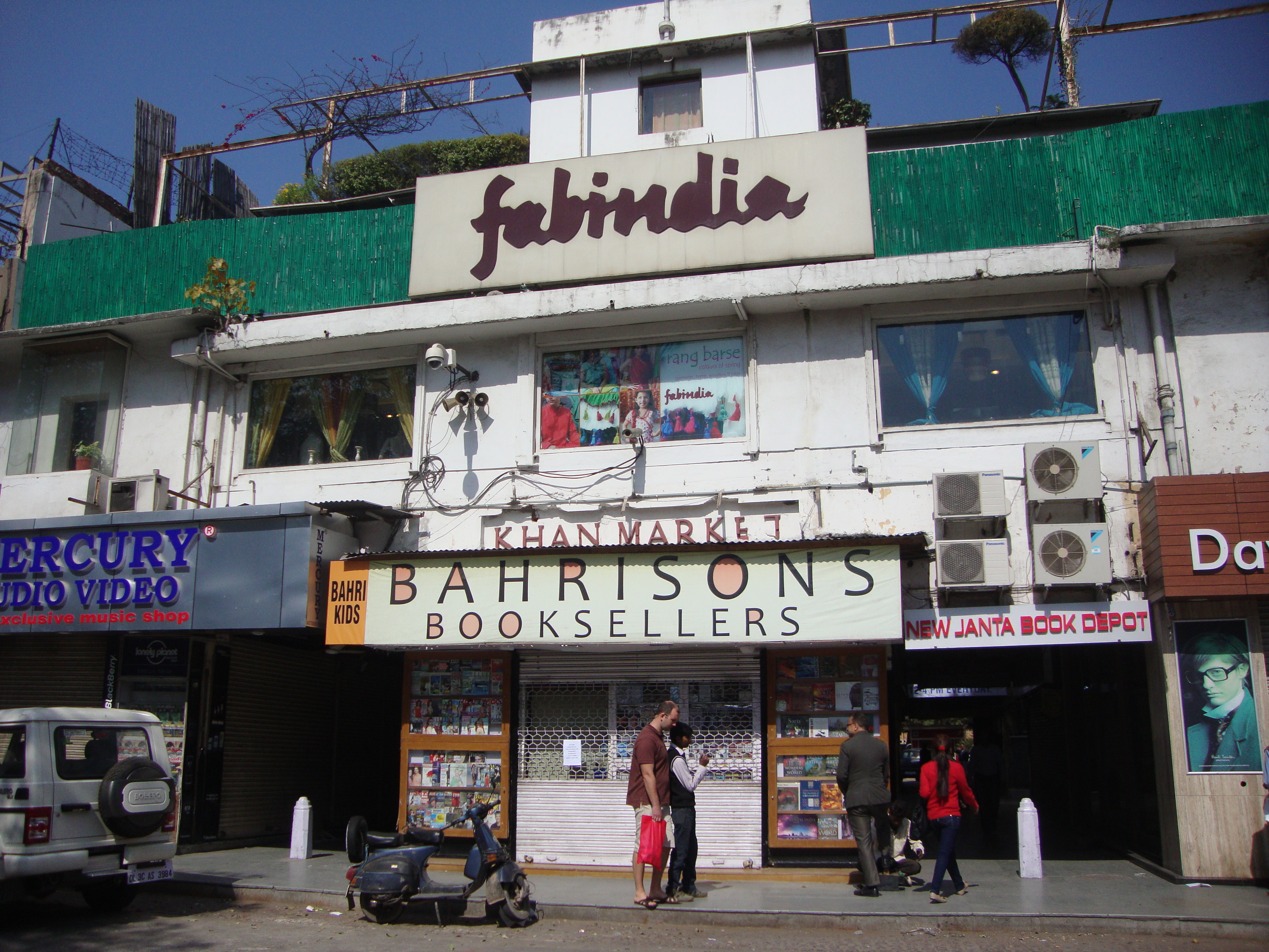 Delhi India ~ Khan Market ~ Bahrison Bookseller